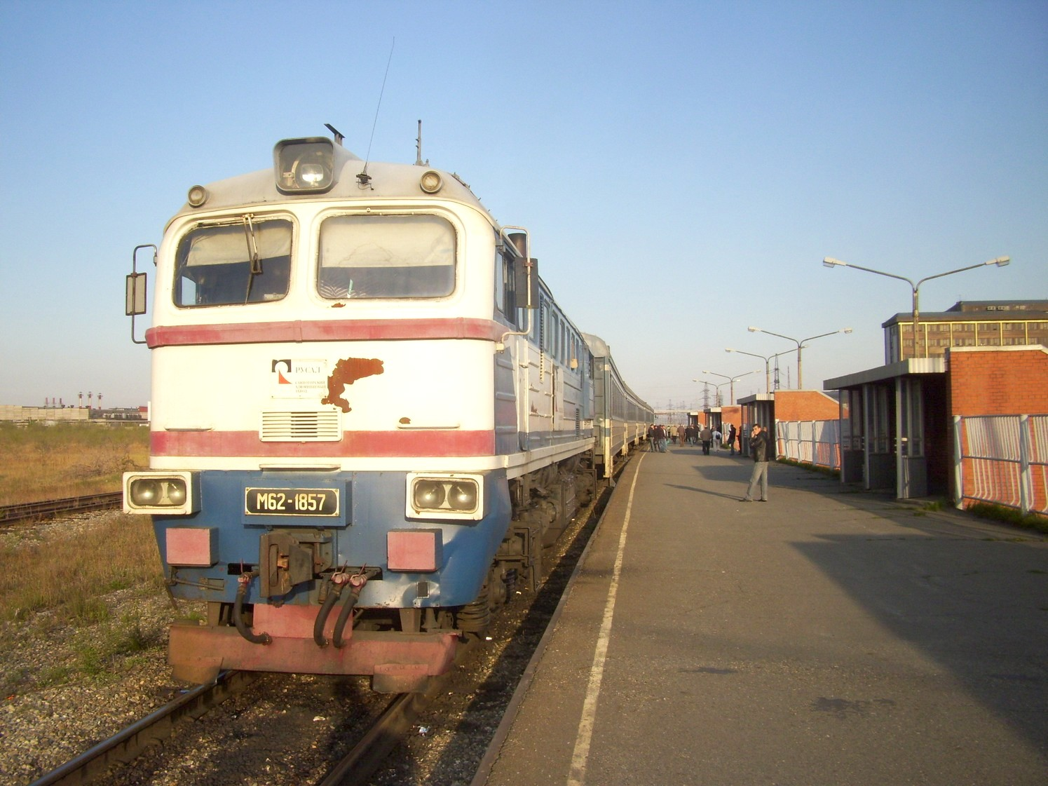 Тепловоз ДМ62-1857 в составе дизель-поезда ДПСаАЗ-0001 на станции Предзаводская (окрестности г. Саяногорск)